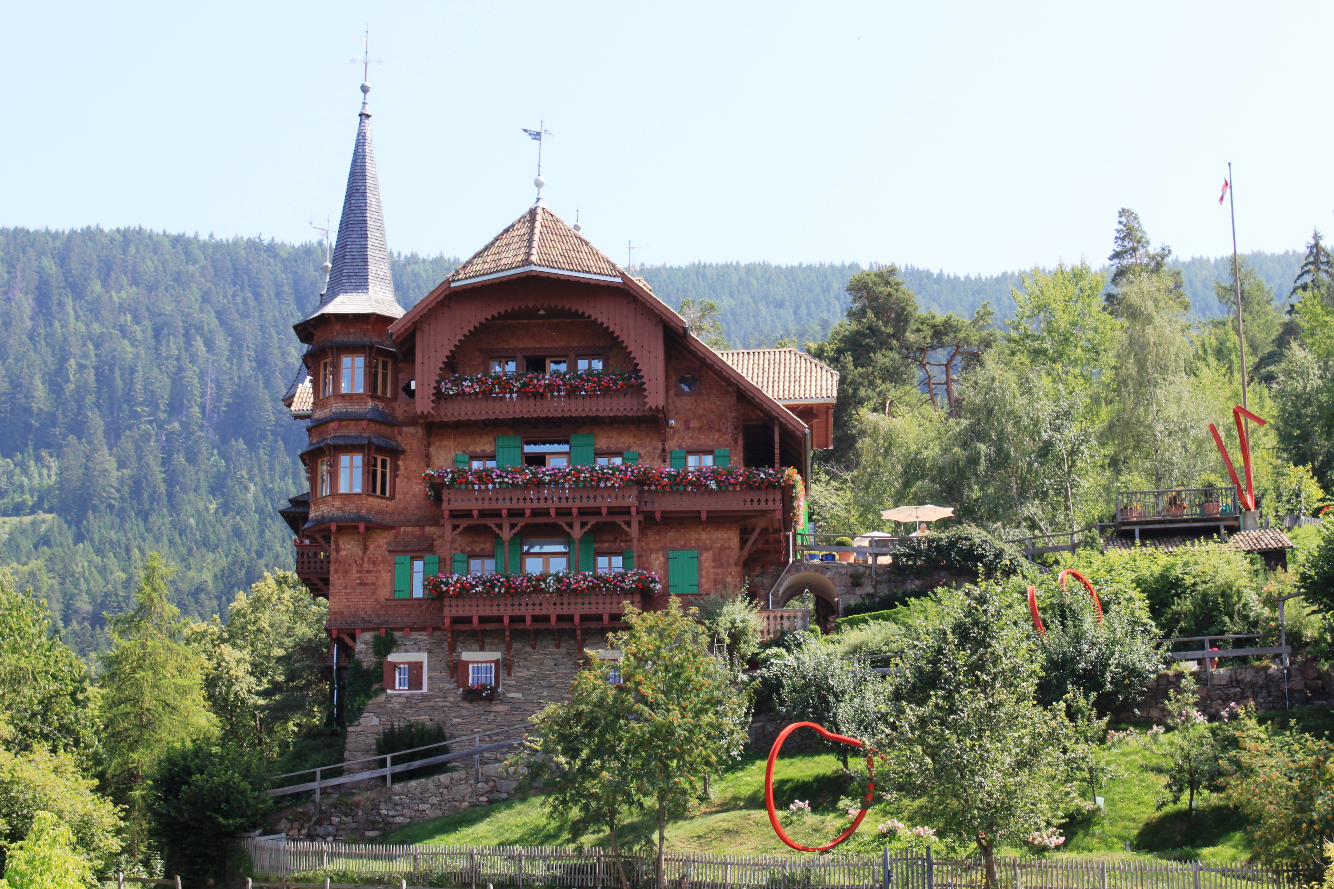 Villa Bittner in Kohlern - das 1896 erbaute Sommerfrischhaus des Bozner Stadtbaumeisters Johann Bittner (1852-1905)